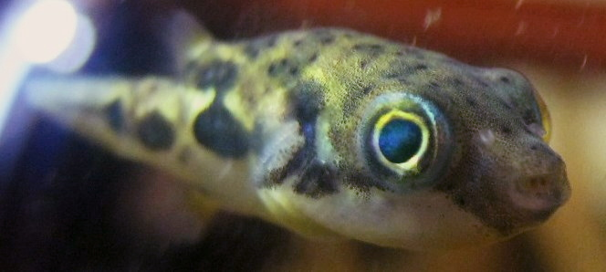 Jest to zdjęcie kolcobrzucha karłowatego w moim akwarium, tuż po aklimatyzacji